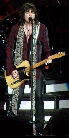 Tom Keifer, Cinderella singer